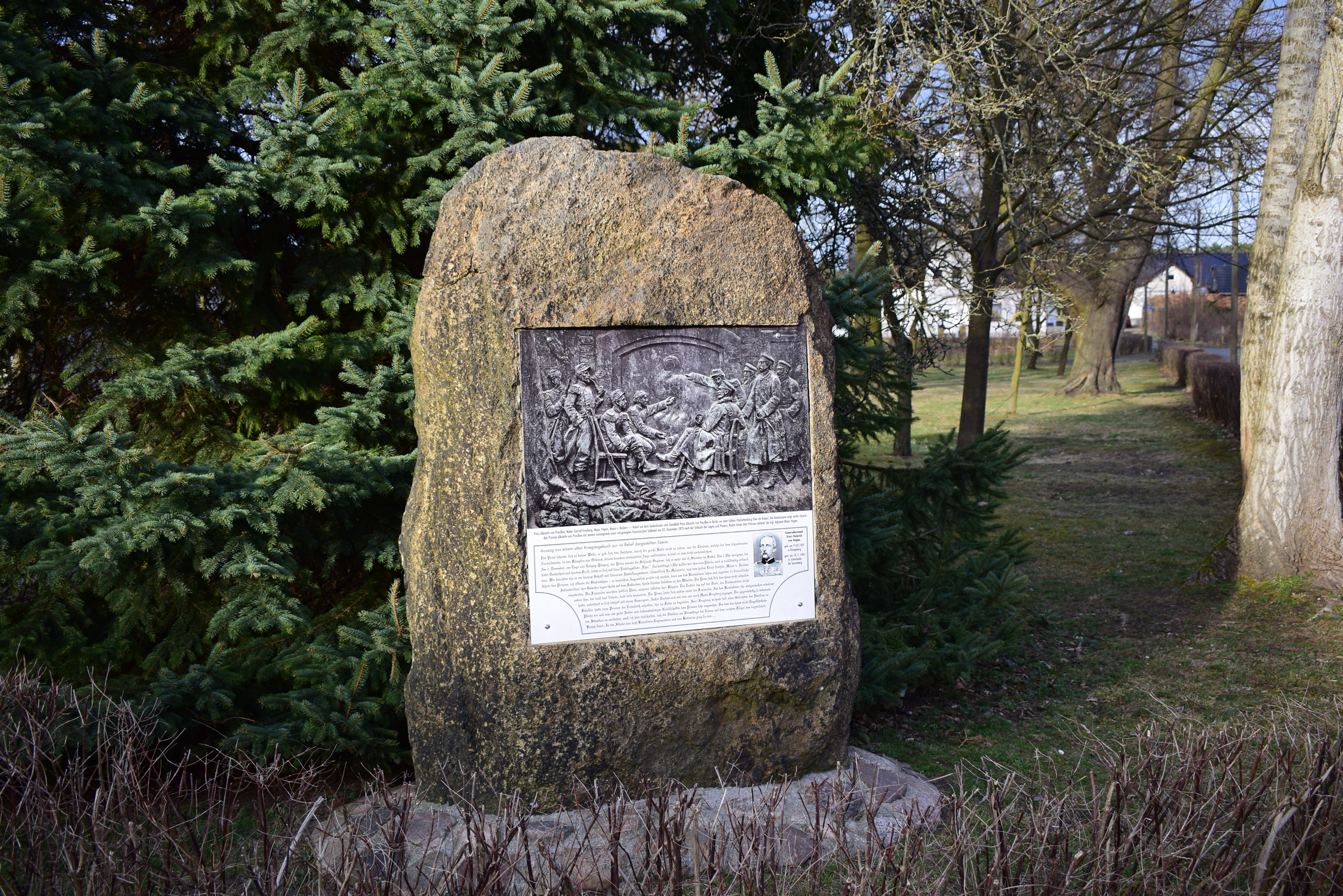 Gedenkstein (Prinzen-Retter-Gedenkstein) vor dem ehemaligen Herrenhaus in Schönheide bei Spremberg.